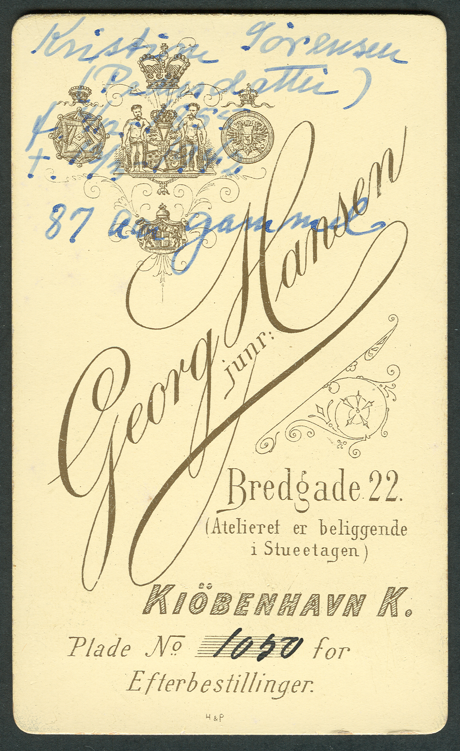 Adressekort for Hoffotograf Georg Hansen junior, Bredgade 22. Han var hoffotograf for det danske hof, og leverede også til Prinsen af Wales, den russiske kejserfamilie og det græske kongehus.